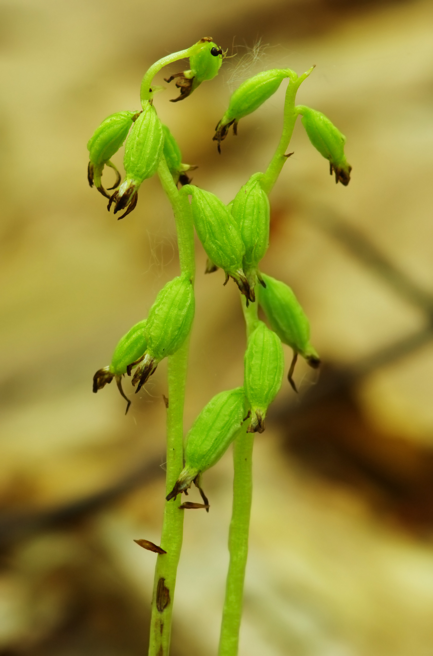 Żłobik koralowy, ż. koralowaty (Corallorhiza trifida) - owoce / Bukowa Góra - Dąbrowa Górnicza